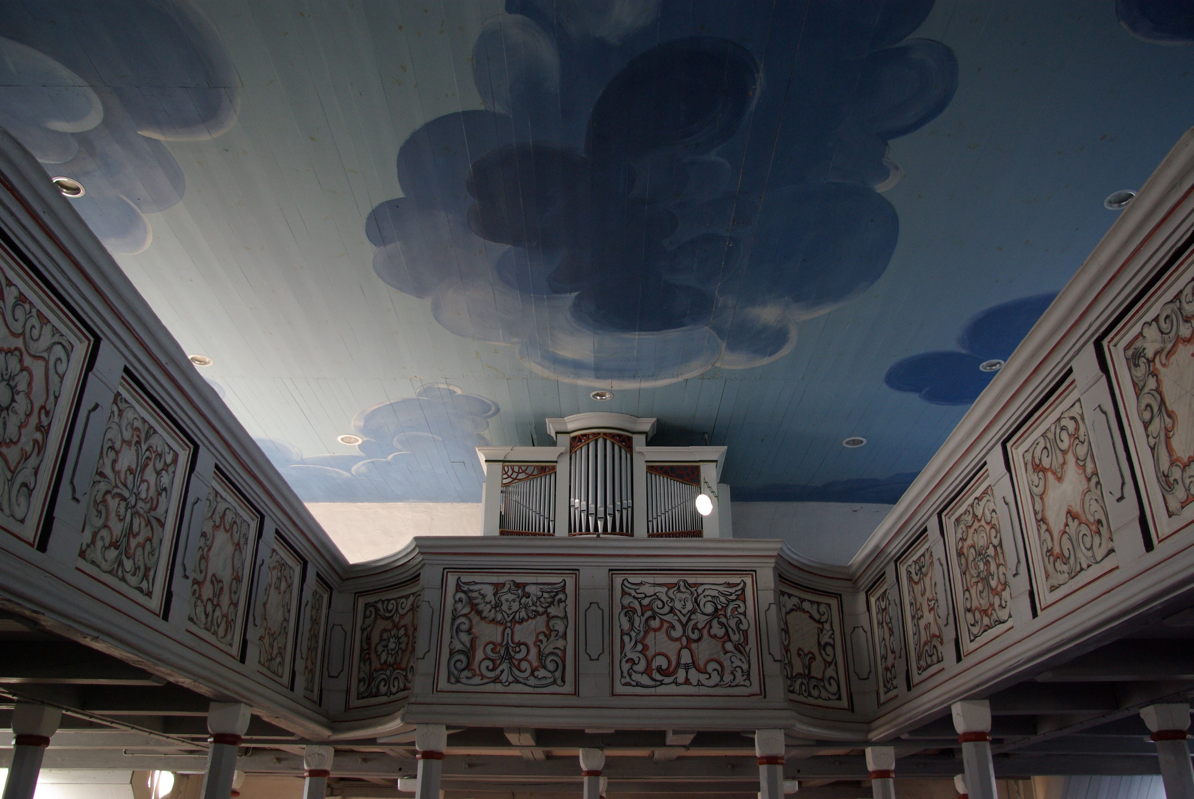 Schlepzi in Brandenburg. Blick auf die Orgel und die Empore. Die Kirche steht unter Denkmalschutz.